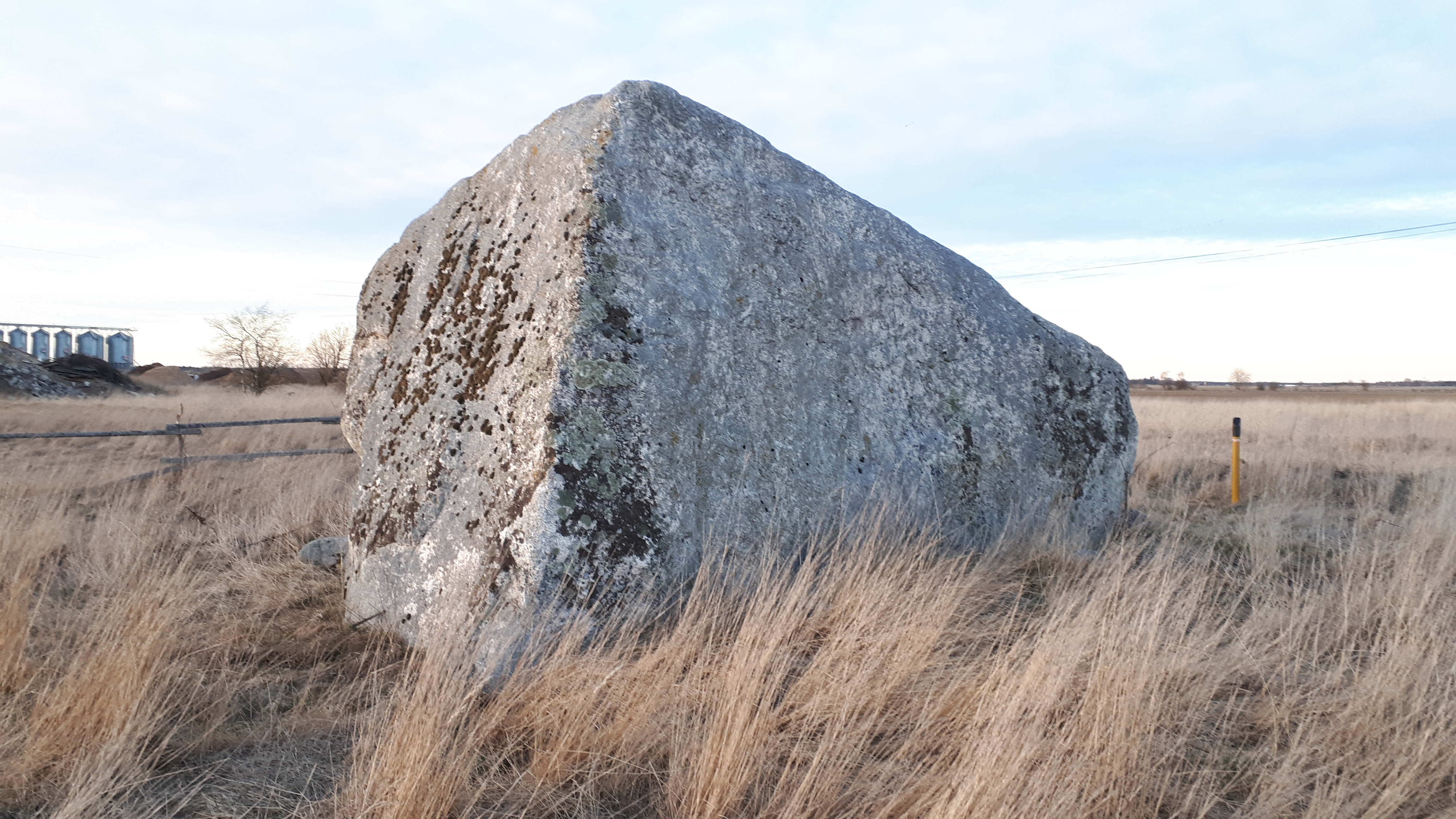 Kostivere liukivi